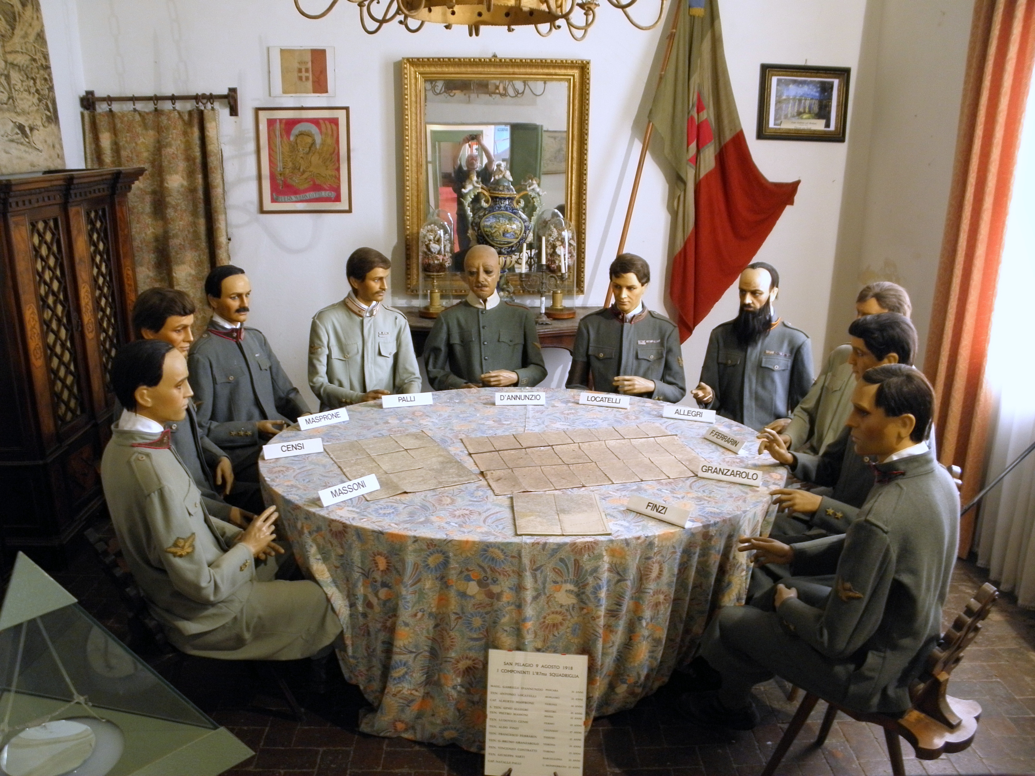 San Pelagio, frazione di Due carrare: Museo dell'aria, sala D'Annunzio. Ricostruzione della sala dove si tenne la pianificazione della missione su Vienna.